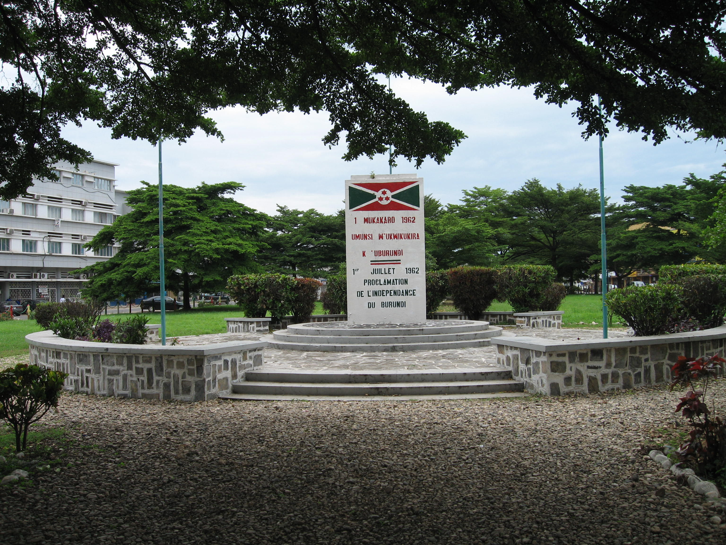 Place de l'Independence. Bujumbura, Burundi.